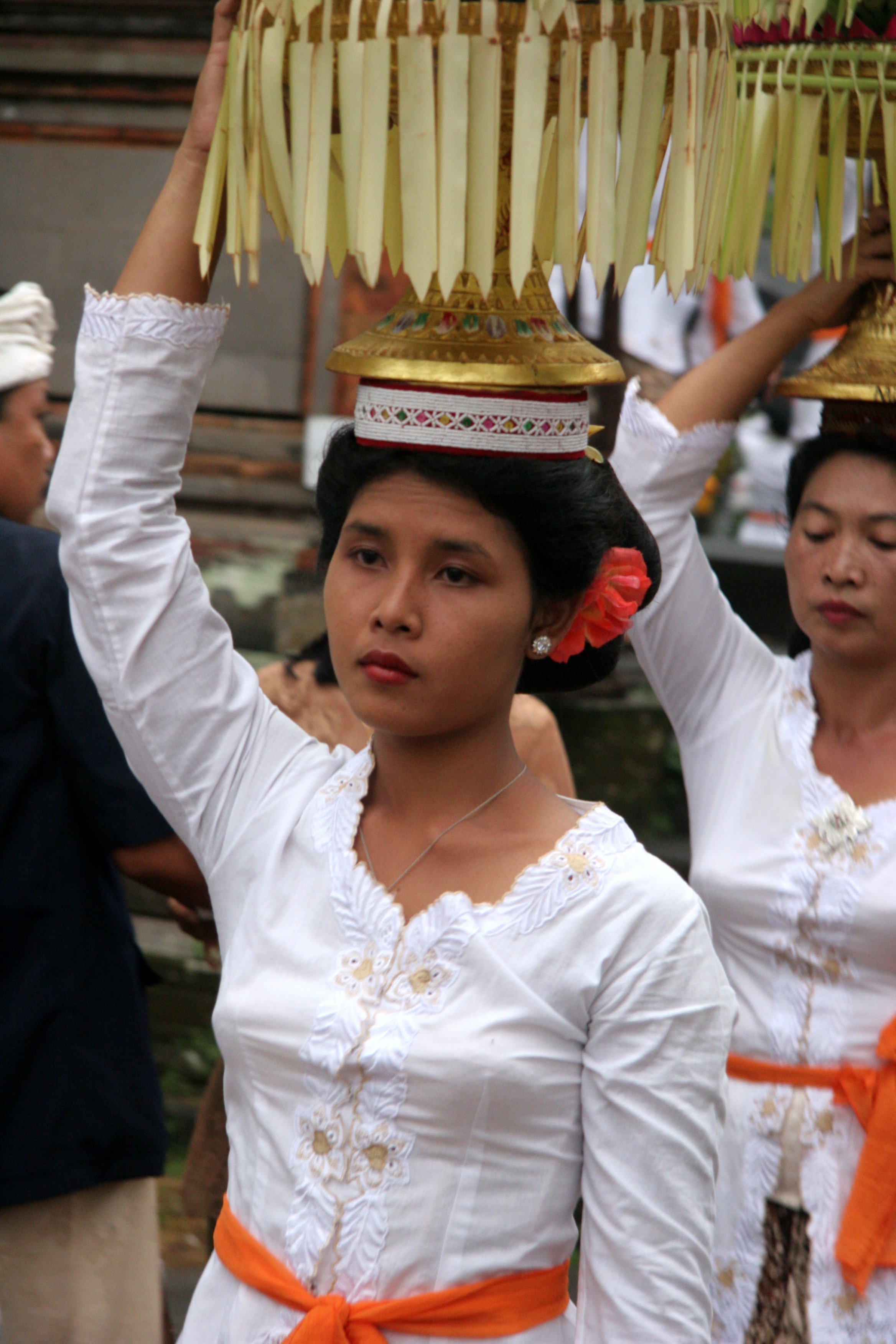 Bali ubud femme avec des offrandes dans un temple